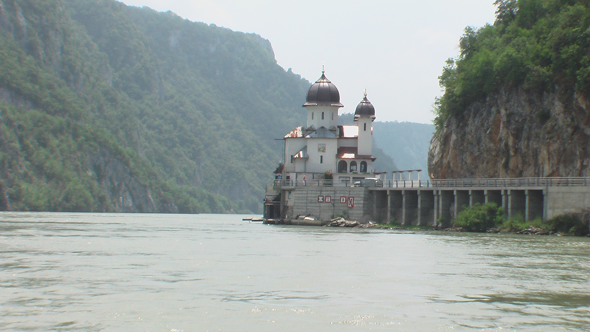 KlosterMraconiaDonau